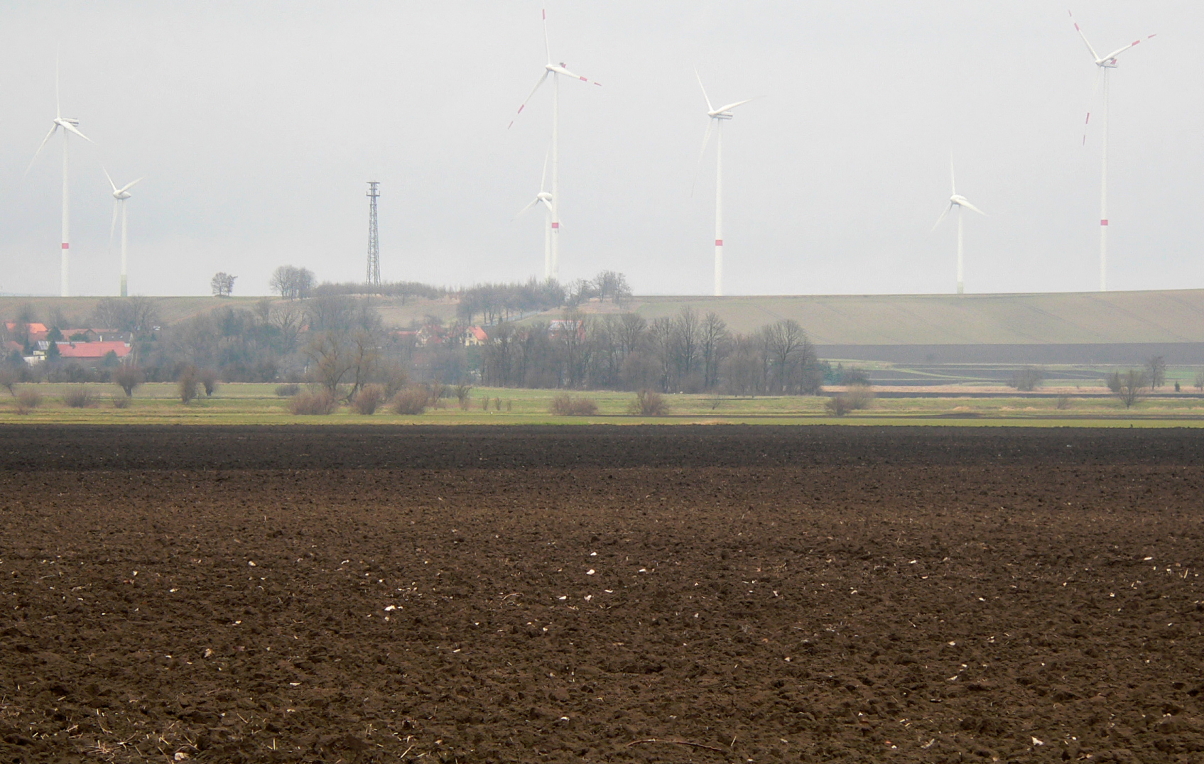 Grosses Bruch